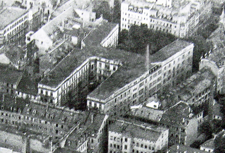 Thiemes Hof in einer Luftaufnahme von ca. 1930 (Ausschnitt)